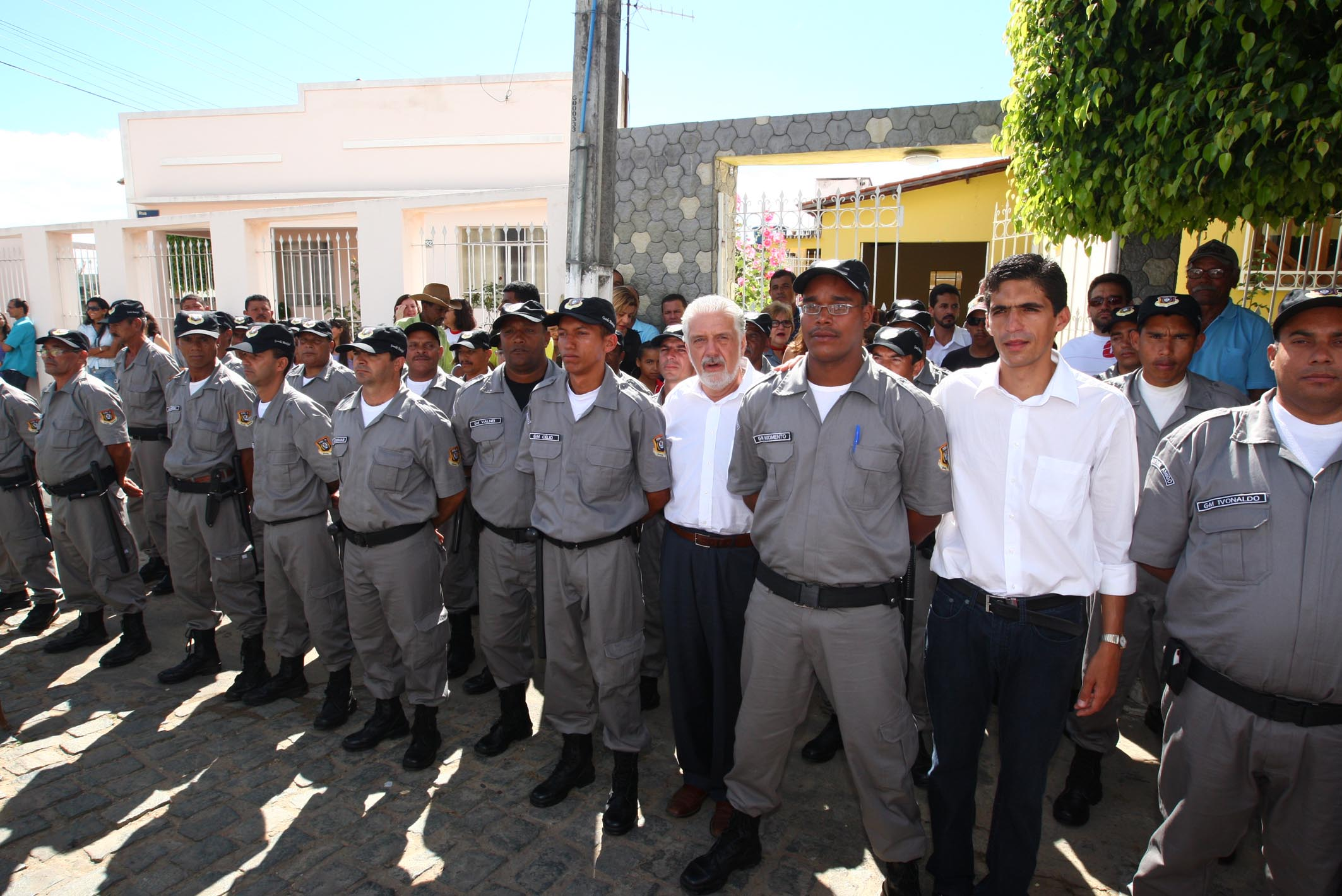 Governador Jaques Wagner com guardas municipais de Poções Foto: Manu Dias / AGECOM